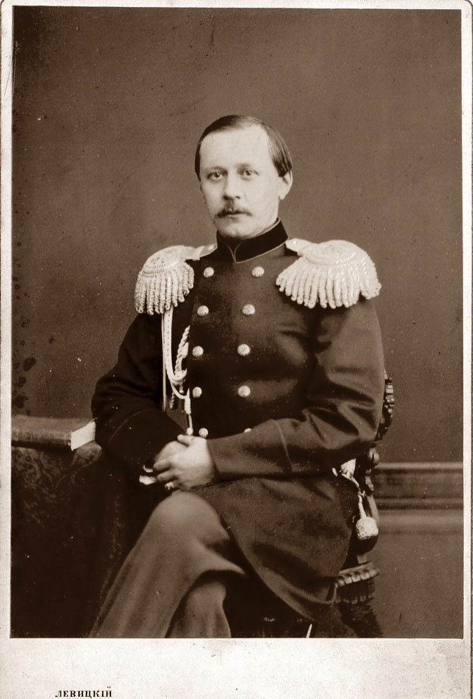 Граф Павел Андреевич Шувалов (1830—1908)